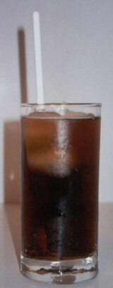 cuba libre cocktail